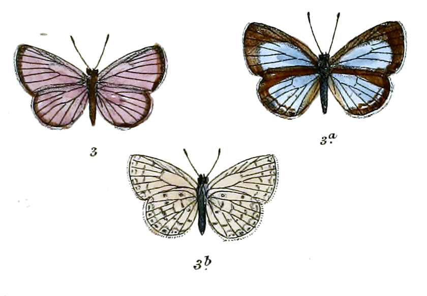 Lycaenopsis musinoides